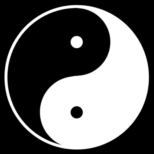 「陽陰勾玉巴（寿の字巴）」紋（染抜）